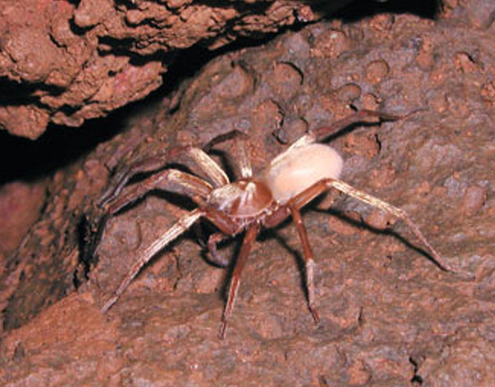 Kaua‘i cave wolf spider (Adelocosa anops)